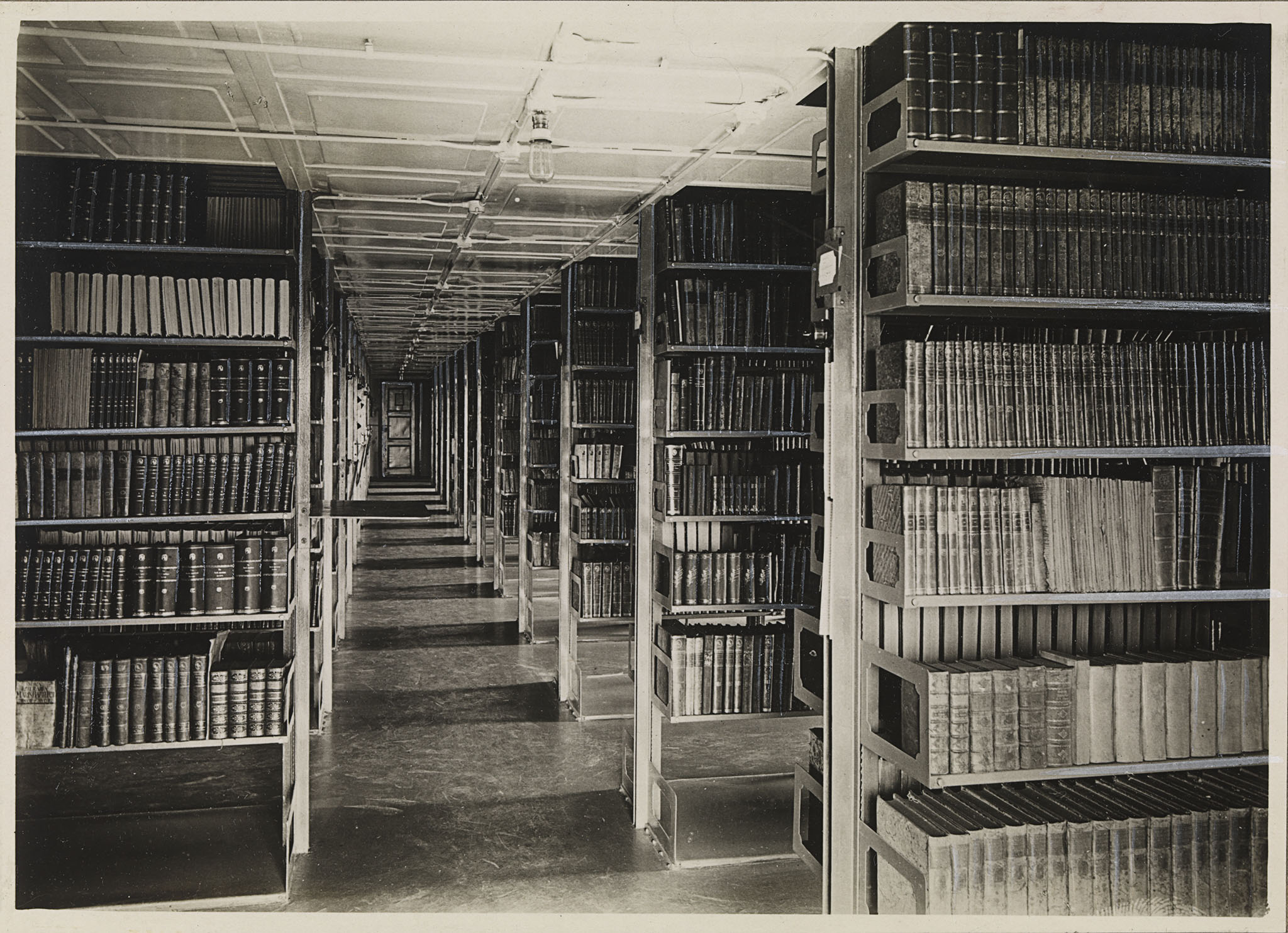 Tittel / Title: Bokmagasin på Nasjonalbiblioteket Beskrivelse / Description: Magasin Vest IV. Den gang Universitetsbiblioteket. Dato / Date: 1914 Fotograf / Photographer: ukjent / unknown Sted / Place: Oslo, Henrik Ibsens gate, Nasjonalbiblioteket Eier / Owner Institution: Nasjonalbiblioteket / National Library of Norway Lenke / Link: Bildesignatur / Image Number: blds_03899